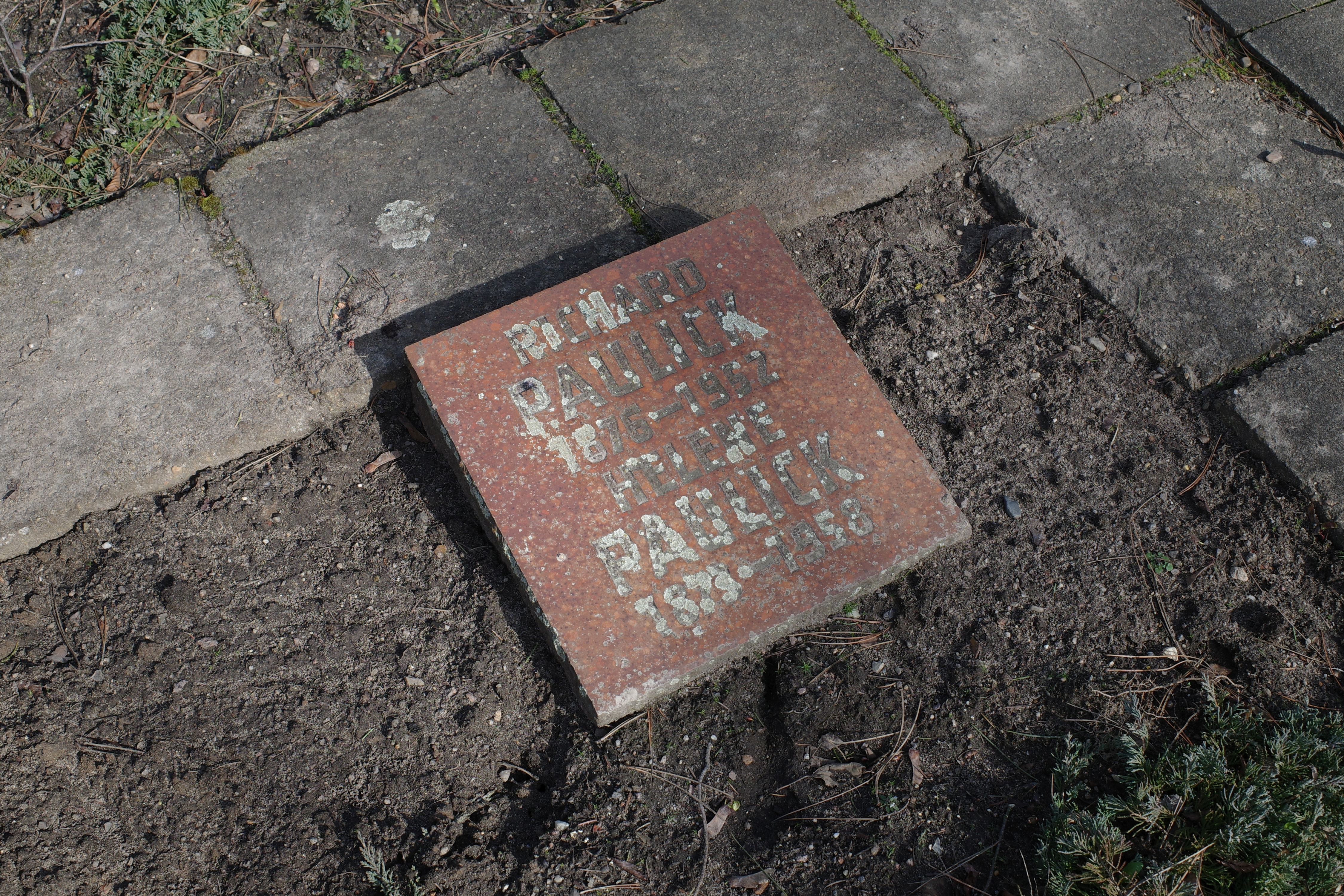 Dessau, Friedhof 3. Ruhestätte vom Politiker Richard Paulick auf der VdN Anlage.